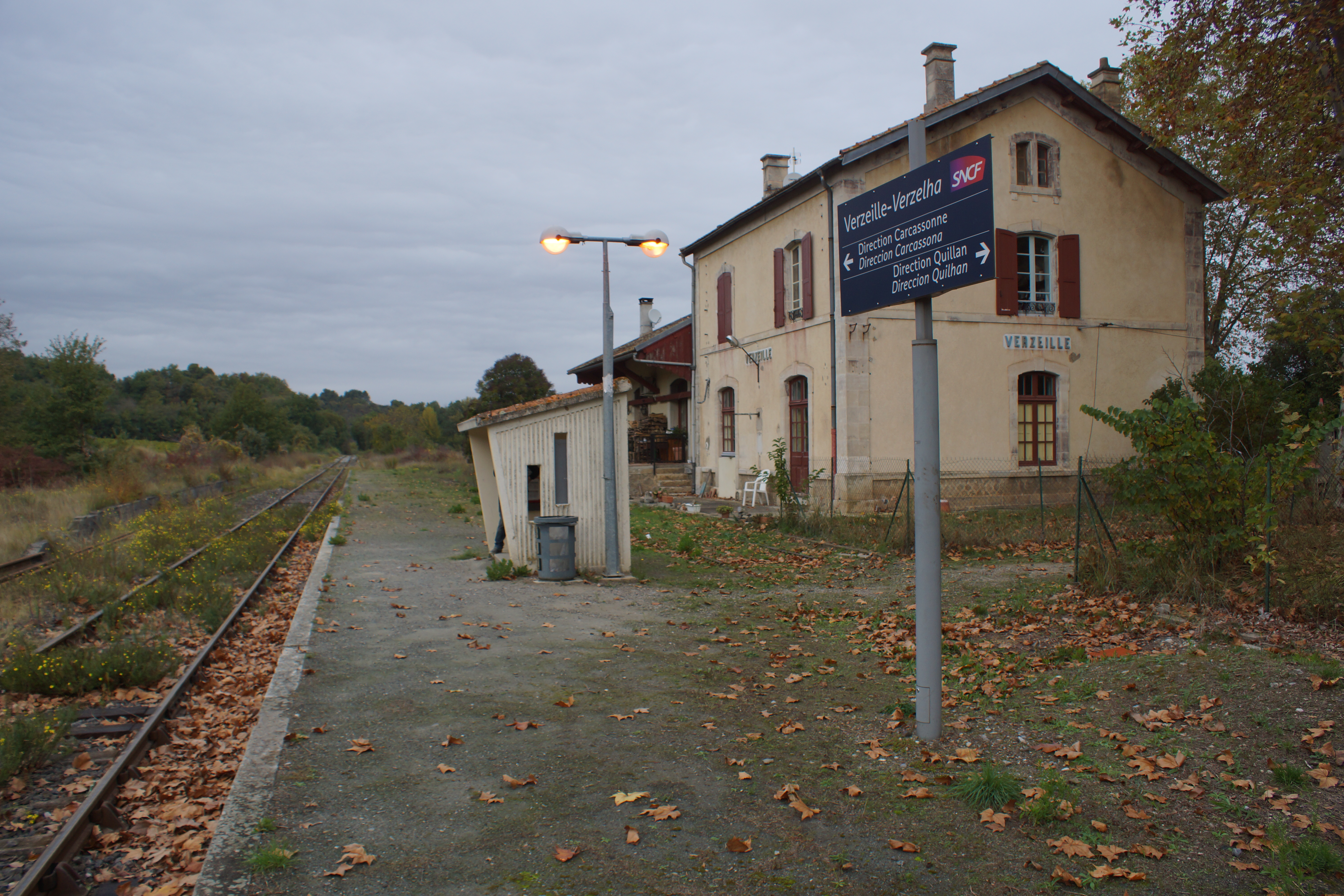 Gare de Verzeille : voie, quai et abri du quai de la halte.